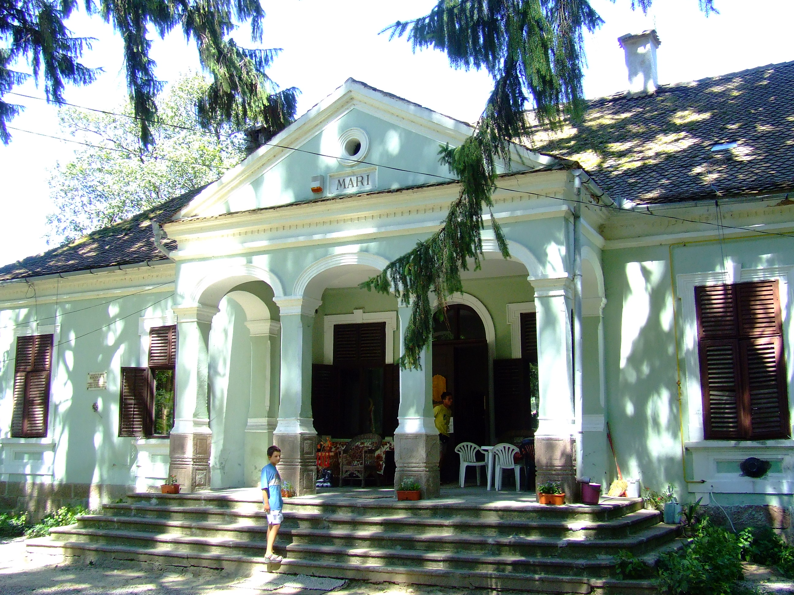 Benedek Elek volt lakóháza Kisbaconban. Ma Benedek Elek Emlékház